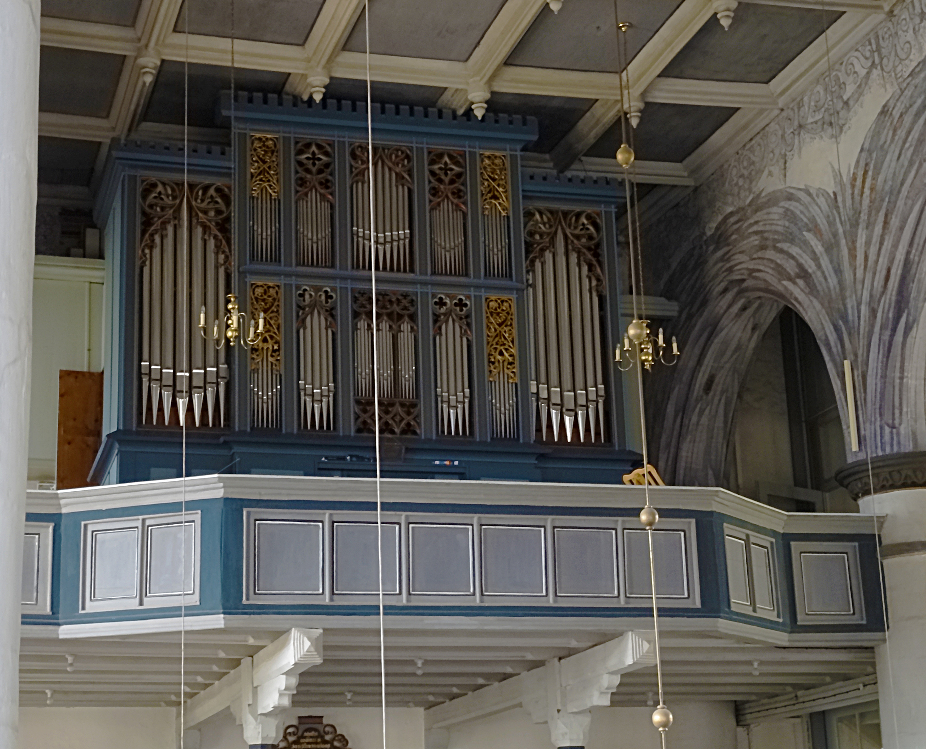 Orgel von Johann Michael Schmidt (1846, Schmiedefeld) in der Dreifaltigkeitskirche St. Nikolai, Eisfeld